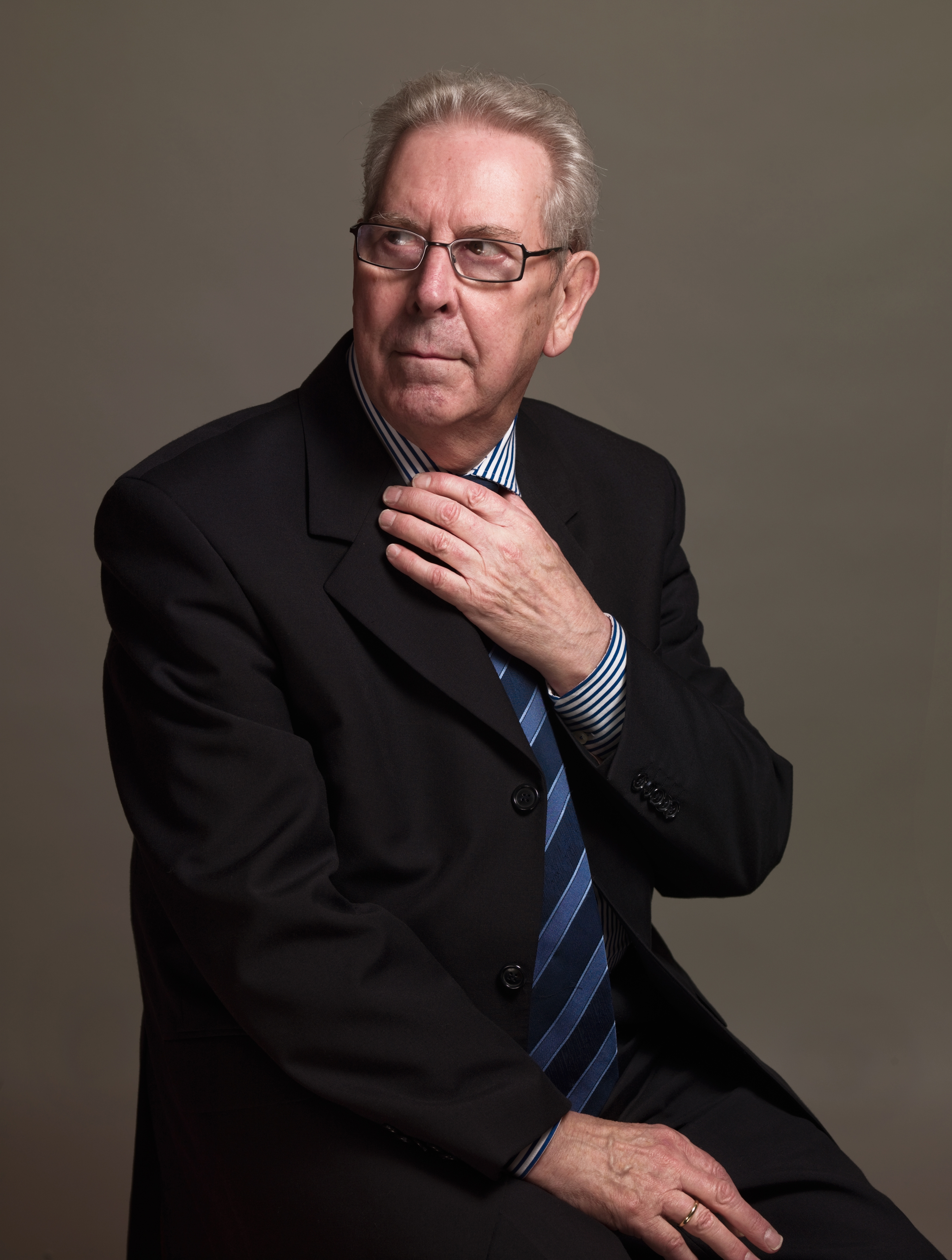 Gerrit (Gert) van den Berg (Rotterdam, 15 oktober 1935) is een Nederlandse politicus voor de Staatkundig Gereformeerde Partij (SGP).